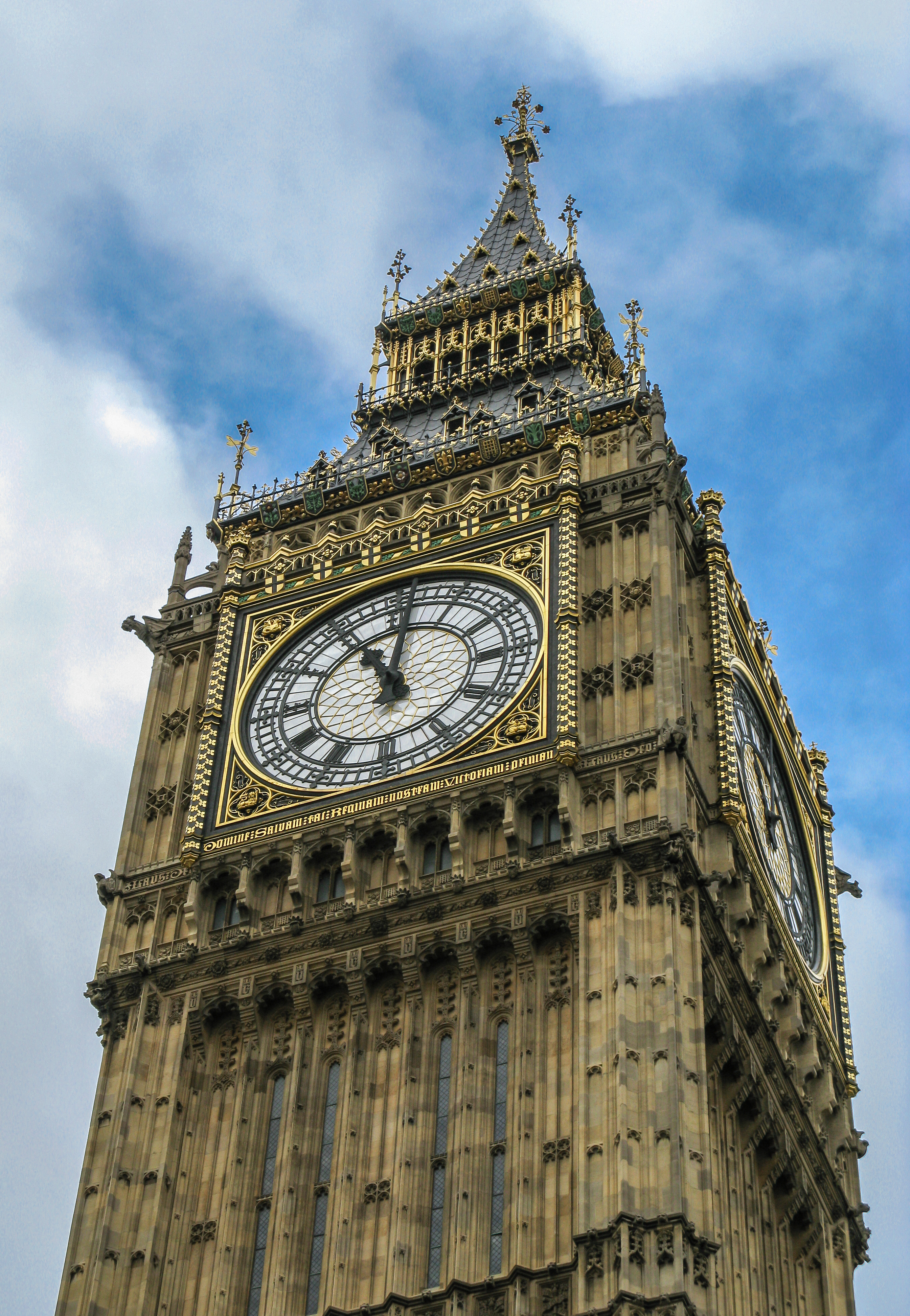 Elizabeth Tower (Clock Tower, „Big Ben“) in London